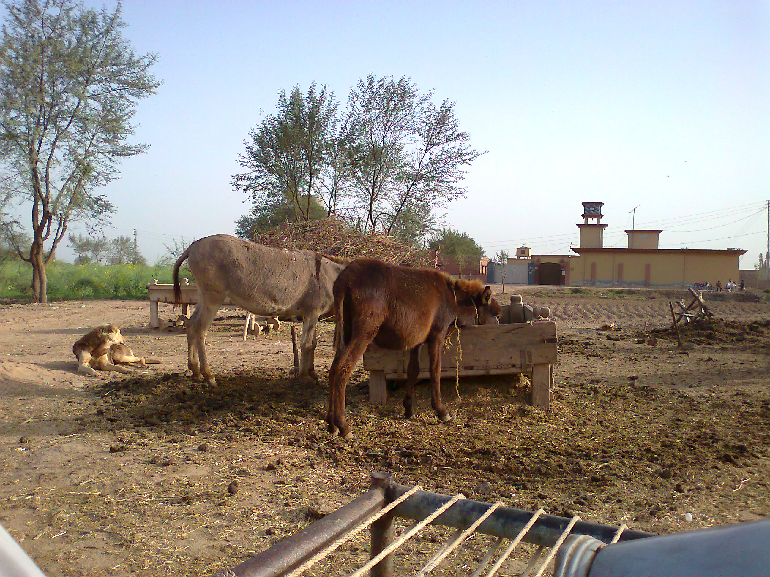 BHAINI OF GILL